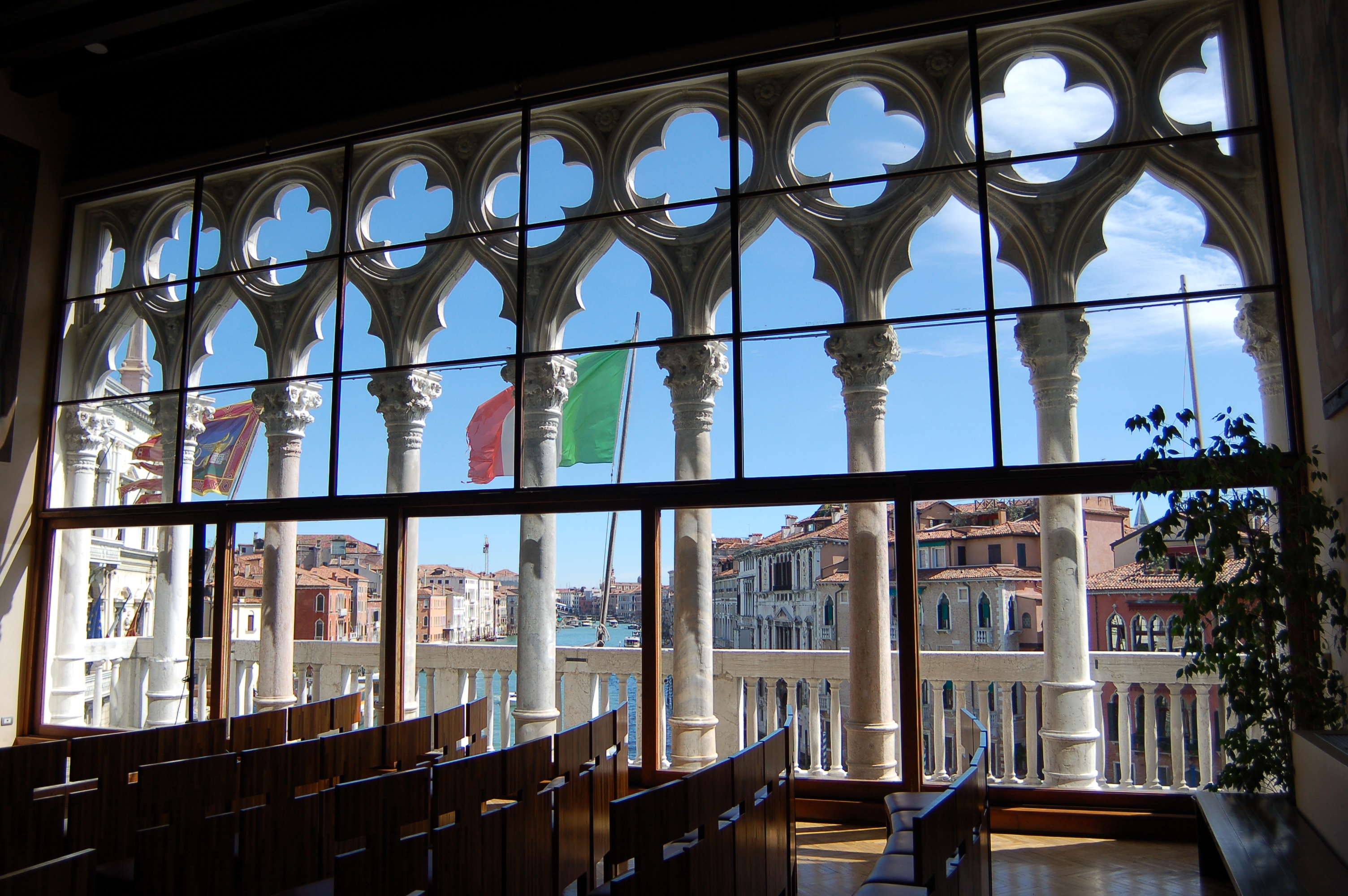 Français cadien: Ca' Foscari-Aula Baratto